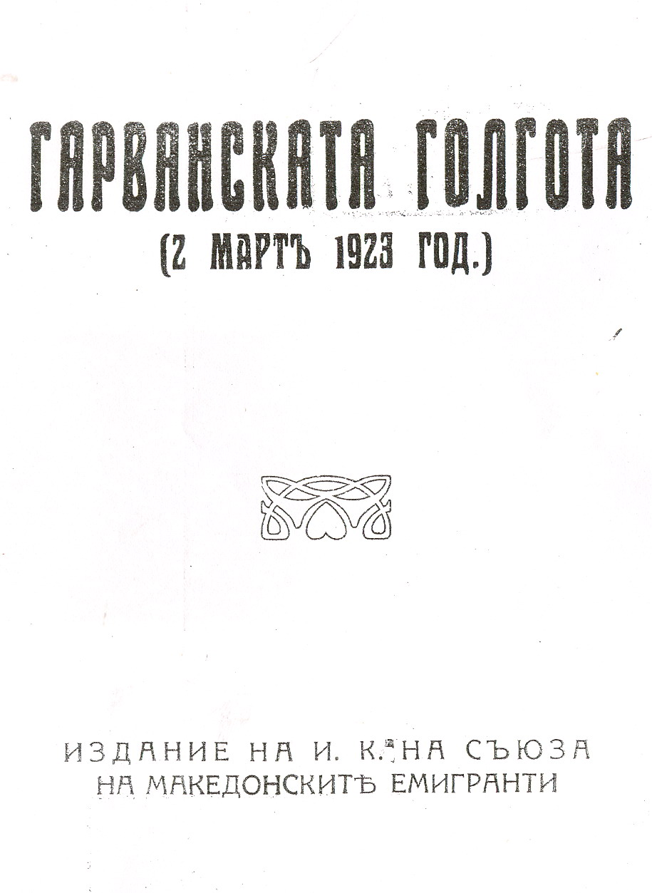 Гарванската голгота